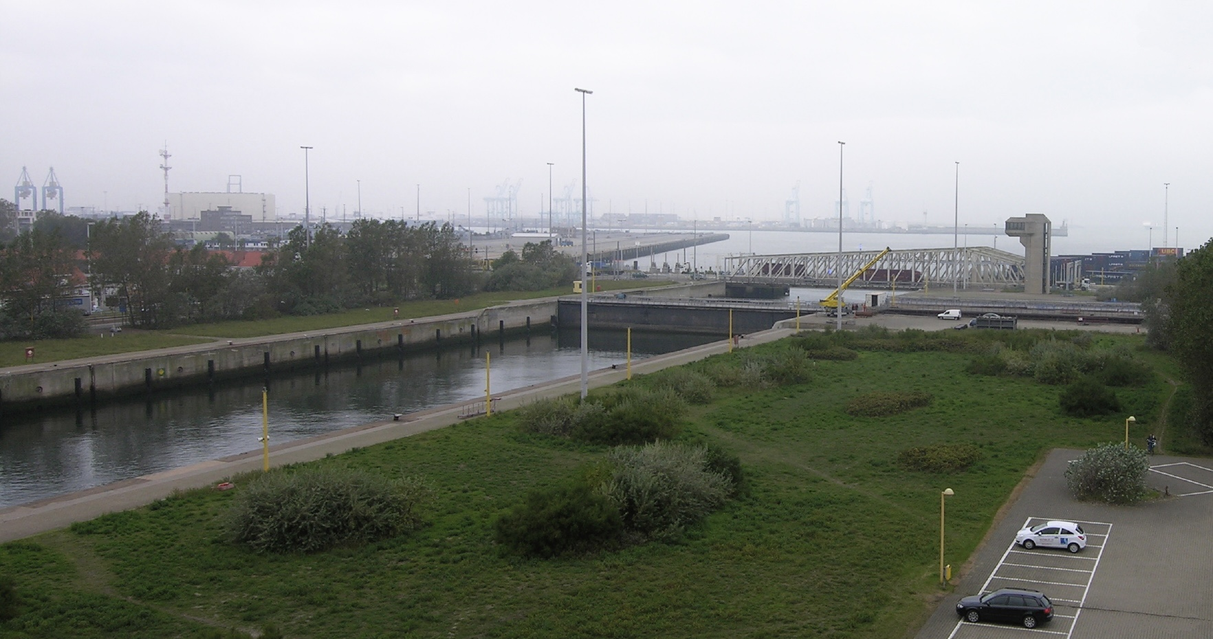 Pierre Vandammesluis